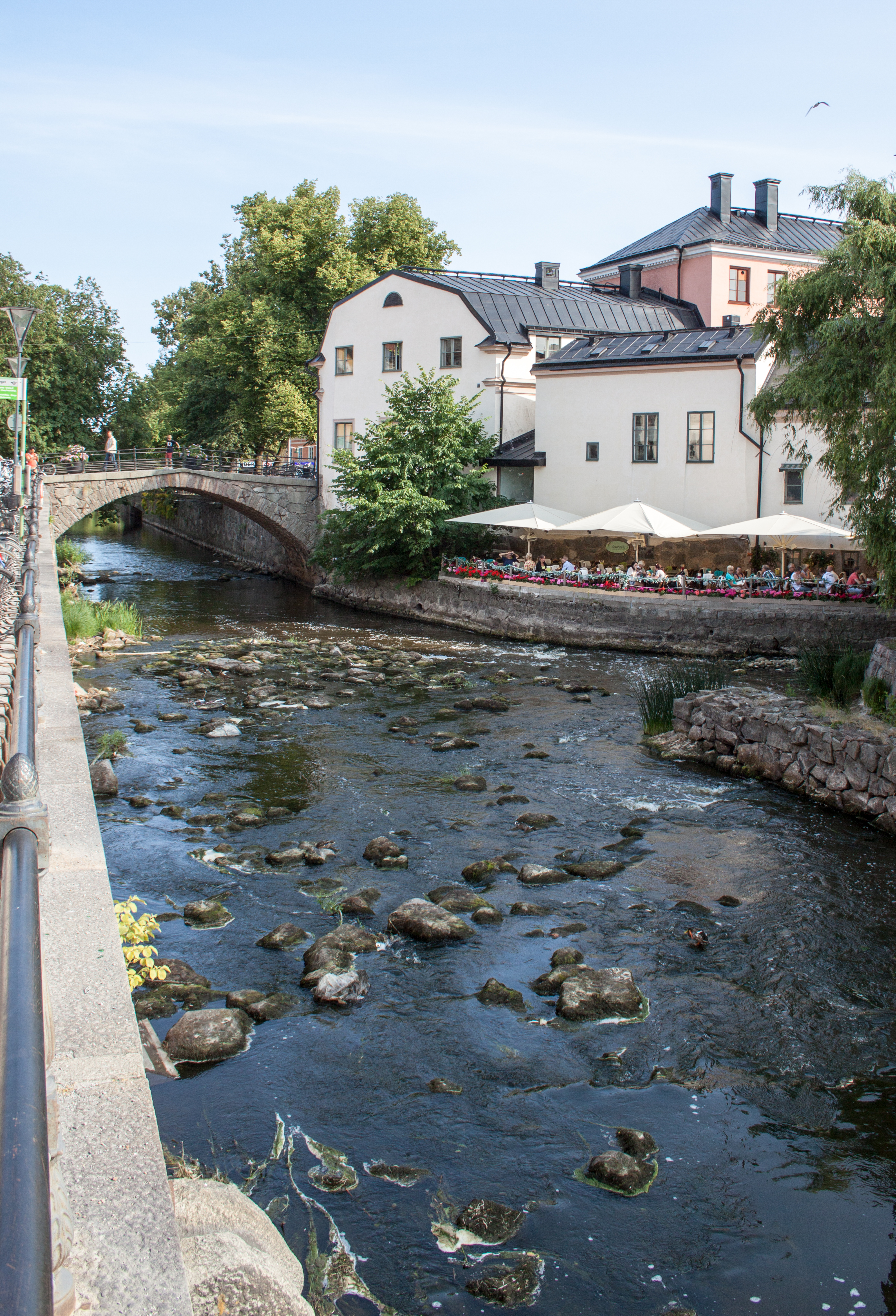 Fyris River in Uppsala